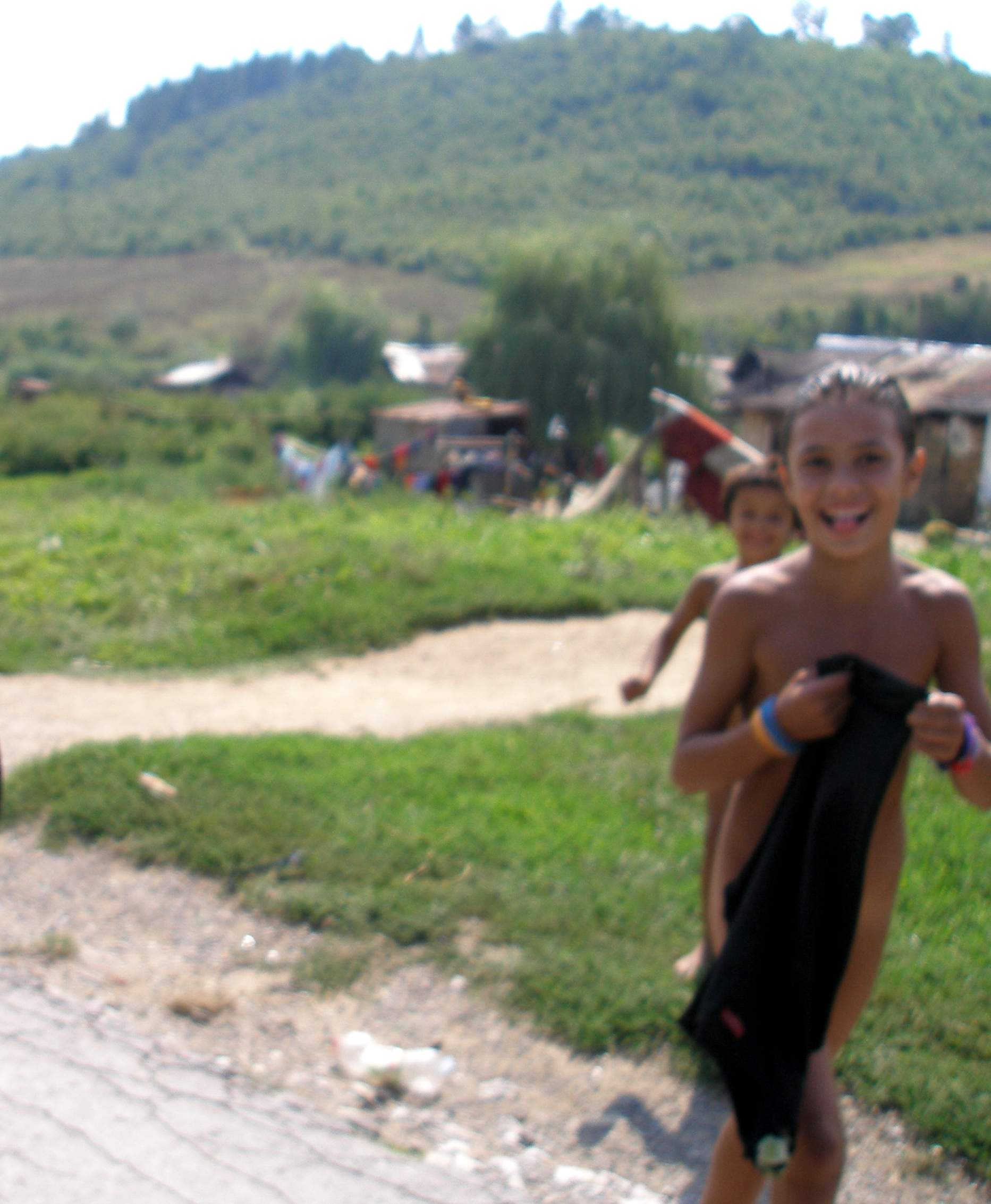 Rómska osada pri obci Chminianske Jakubovany okres Prešov región Šariš